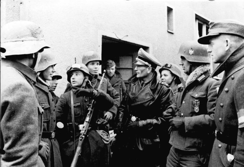 Note: This description has been identified as biased or incorrect: East german propaganda. ADN-ZB II. Weltkrieg 1939-45 Deutsch-sowjetische Front, Pommern Februar 1945: Zur Verteidigung der pommerschen Stadt Pyritz scheuten sich die deutschen Faschisten nicht, auch eine Hitler-Jugend-Kompanie des Volkssturmes einzusetzen. Hier die Jungen im Gespräch mit einem H.J.-Führer der Gebietsleitung. [Scherl Bilderdienst]